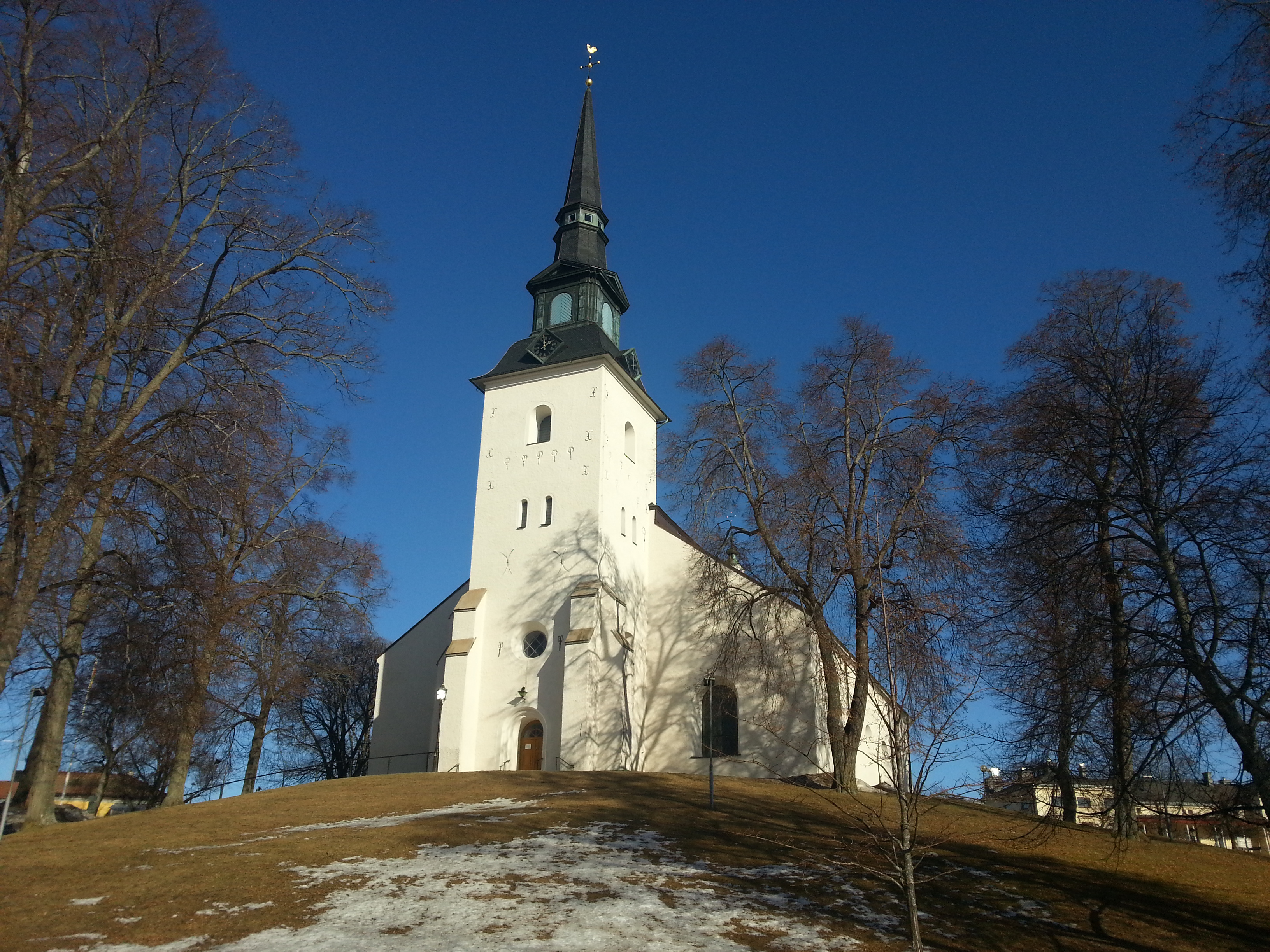 Lindesbergs kyrka under en klarblå himmel i mars 2013